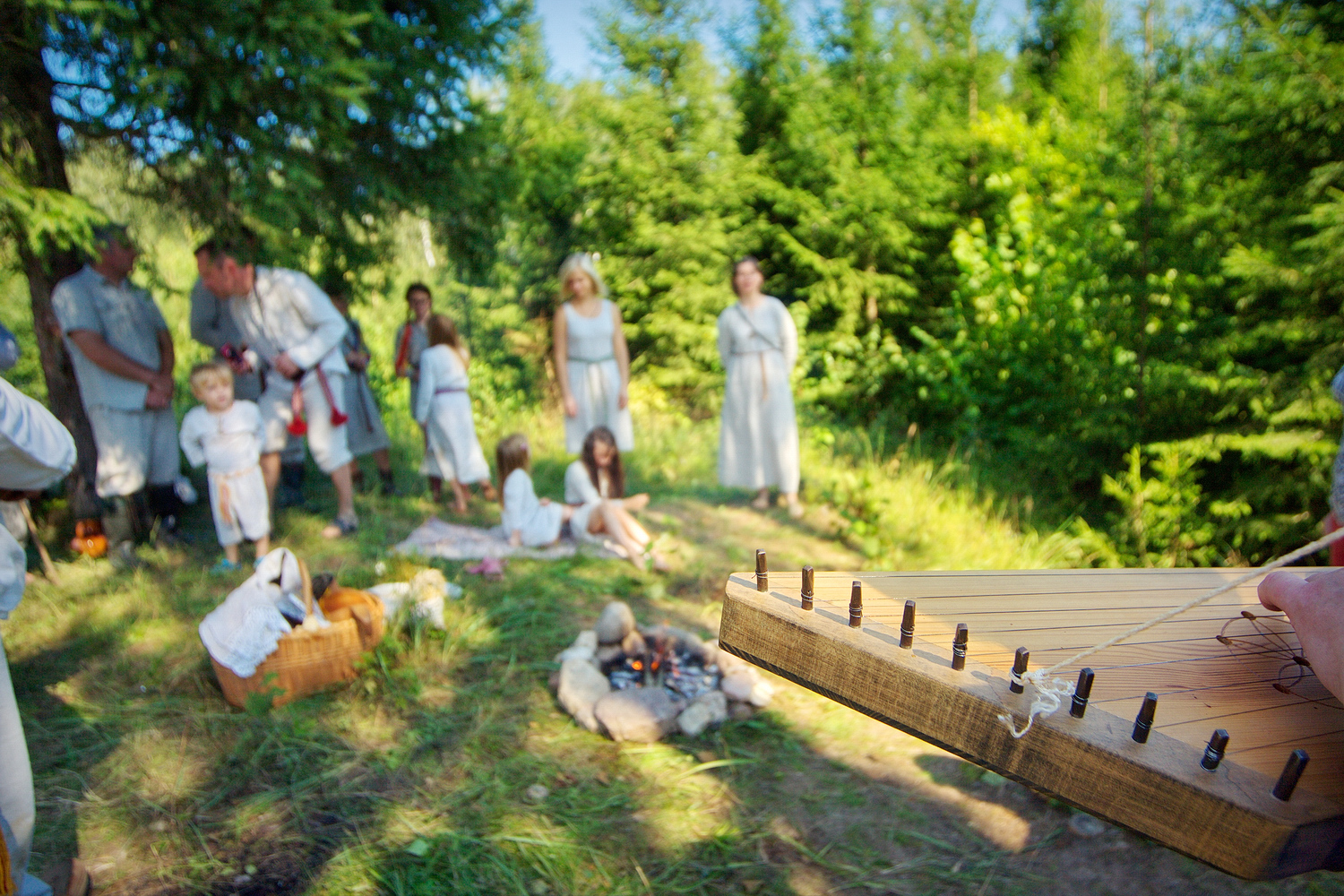 Įvesdinimo apeigos ant Dijokalnio